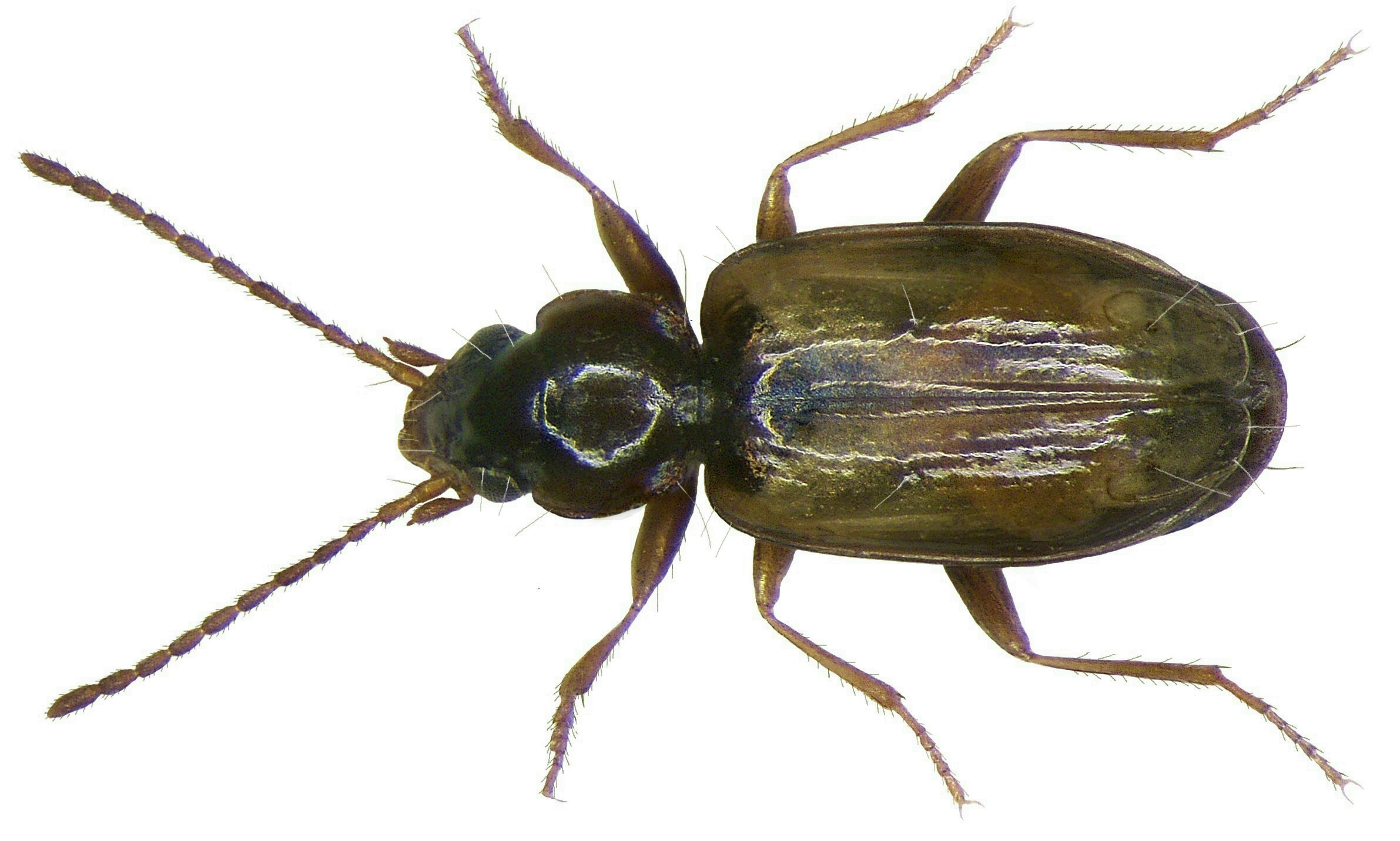 Familie: Carabidae Größe: 2,3-2,6 mm Verbreitung: pontomediterran Fundort: Italia, Adria, Cervia Ökologie: halophil leg.det. U.Schmidt, 1987 Foto: U.Schmidt, 2008